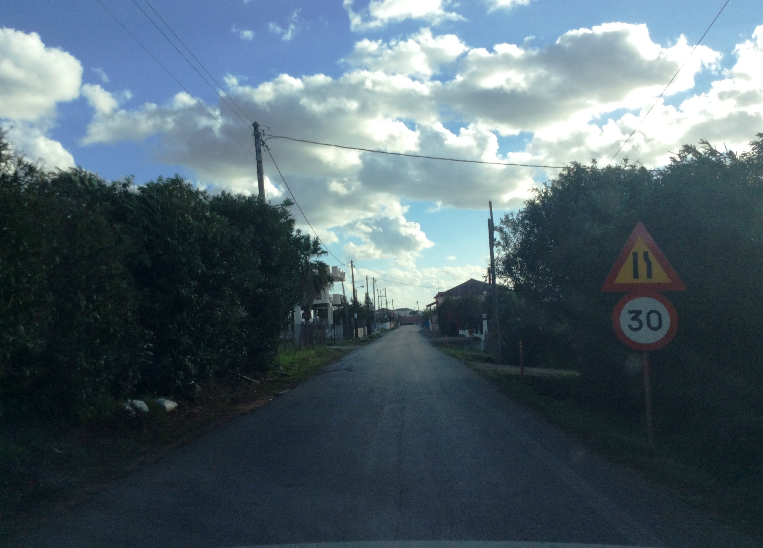 Αγία Κυριακή Μεσσηνίας